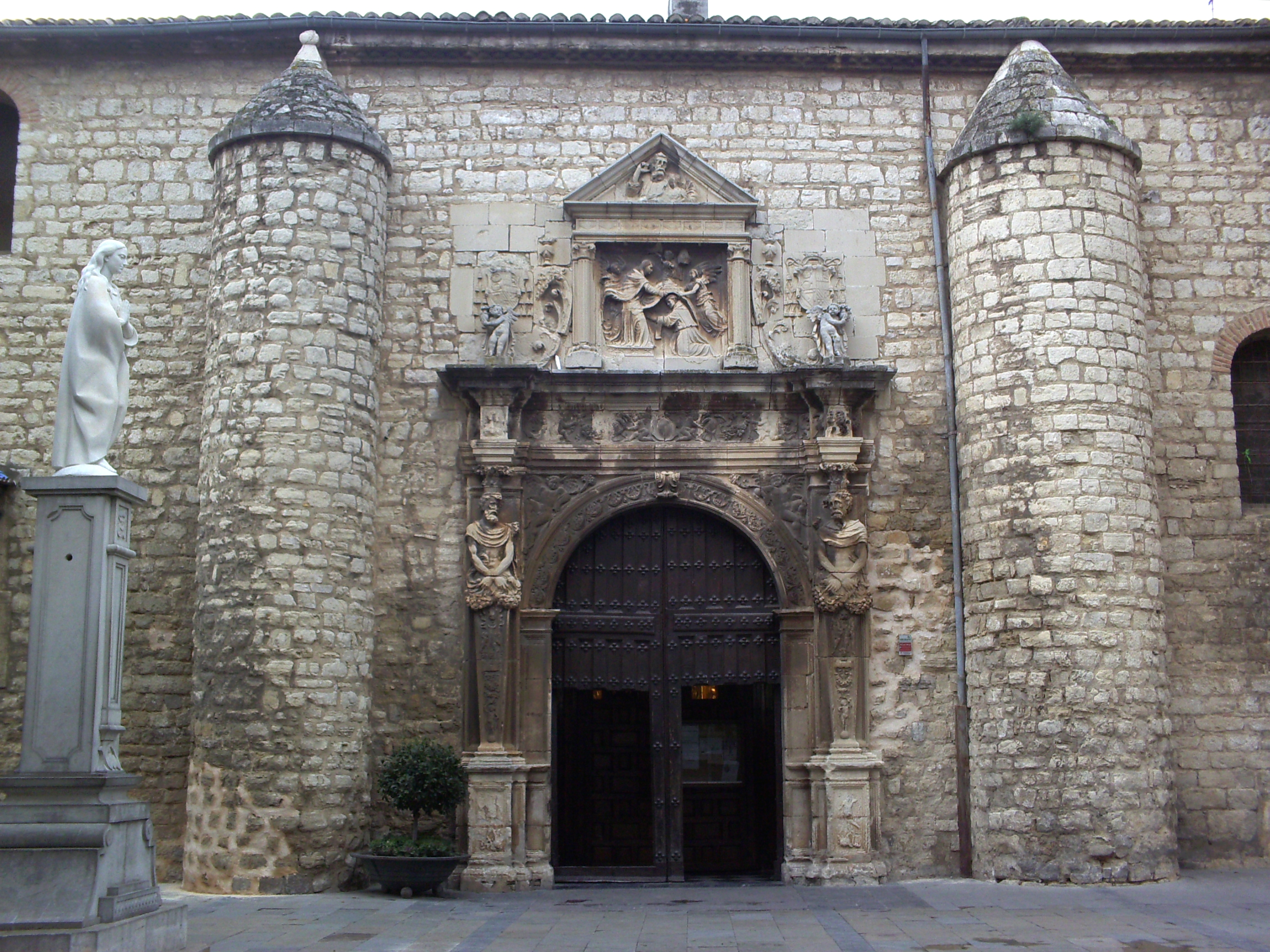 Portada renacentista de la Iglesia de San Ildefonso, en Jaén.